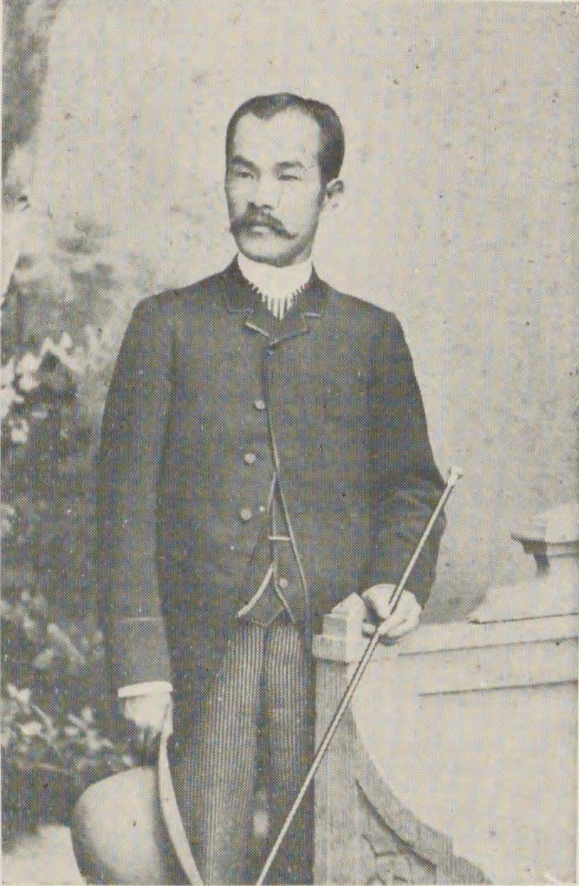 明治21年の一瀬勇三郎